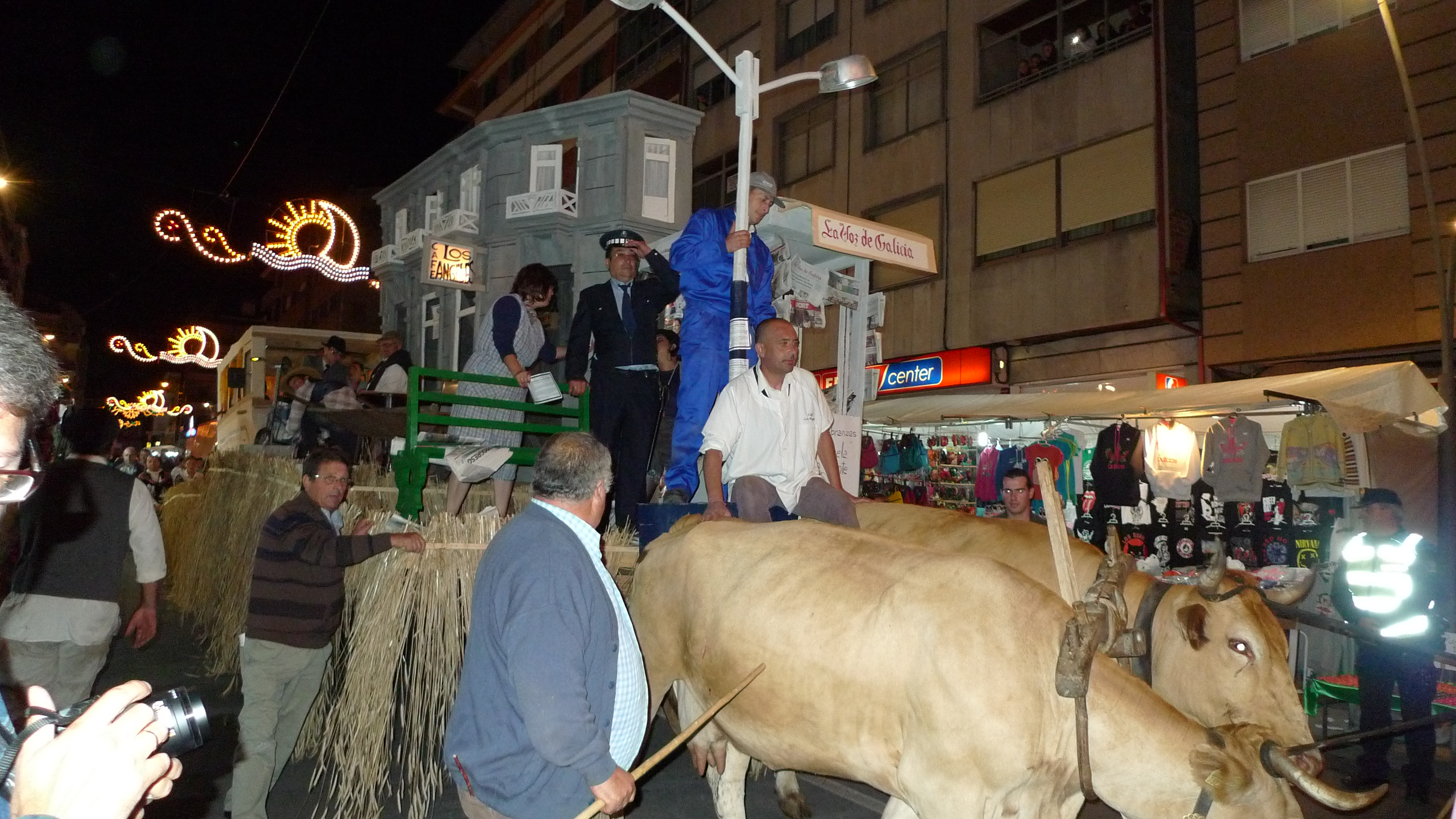 Folión de carros 2013 (Chantada)